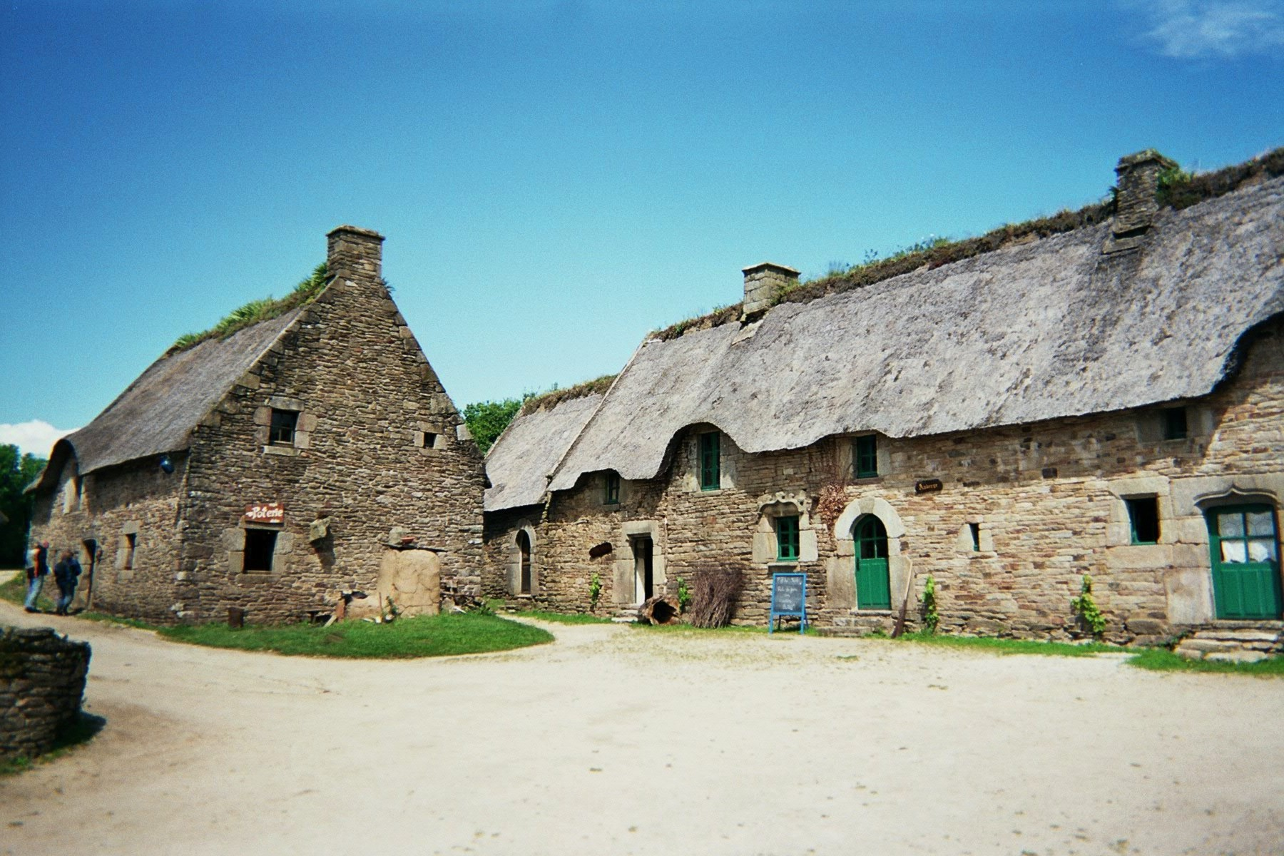 Village ancien de Poul-Fétan